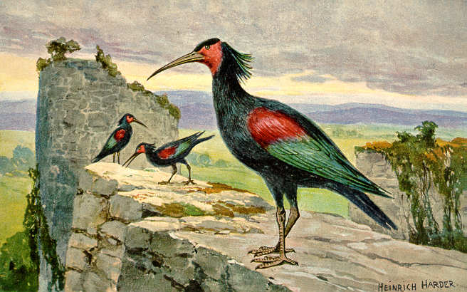 Waldrapp.